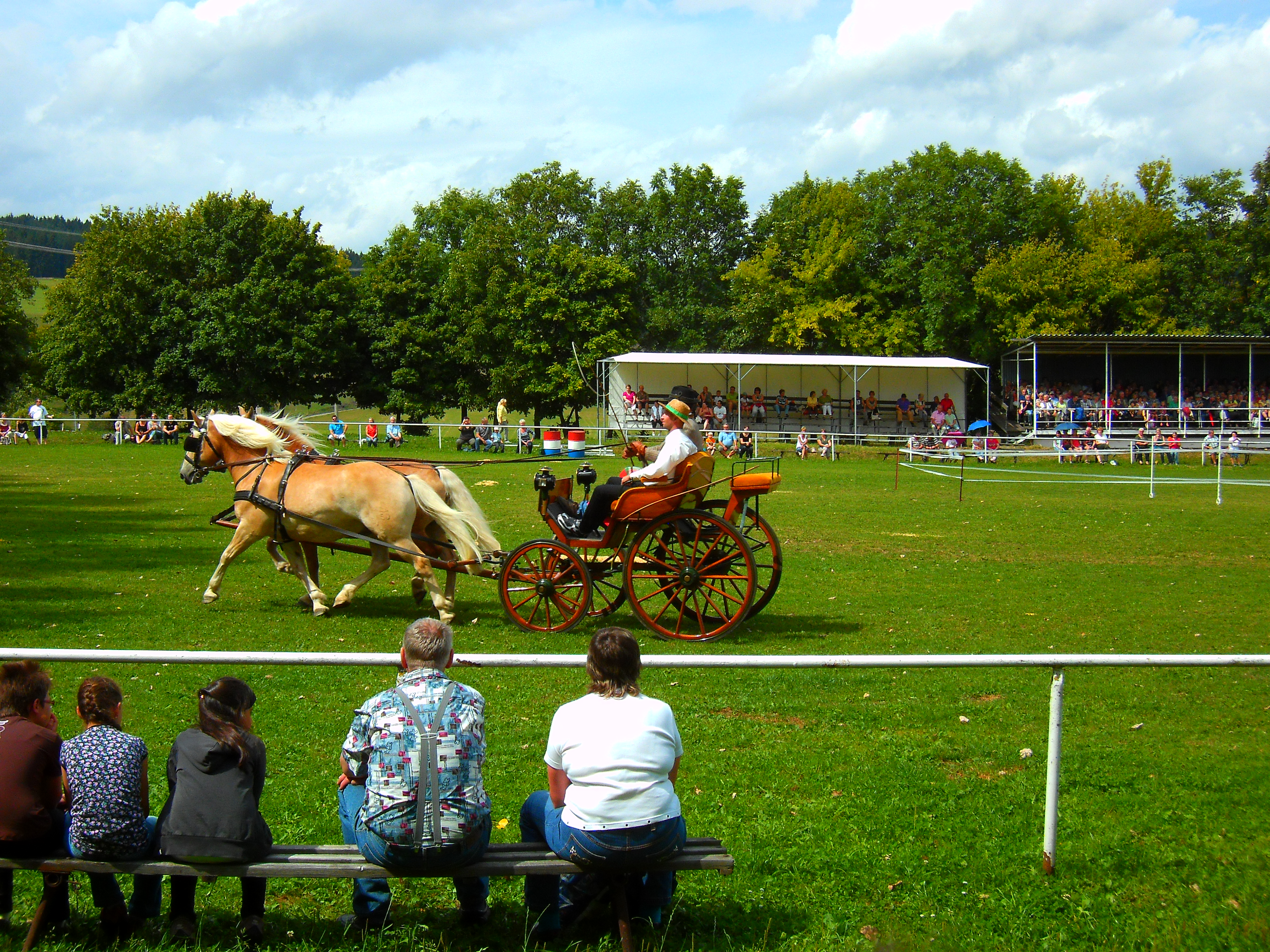 Edelbluthaflinger und Haflinger im Haflingergestüt Meura